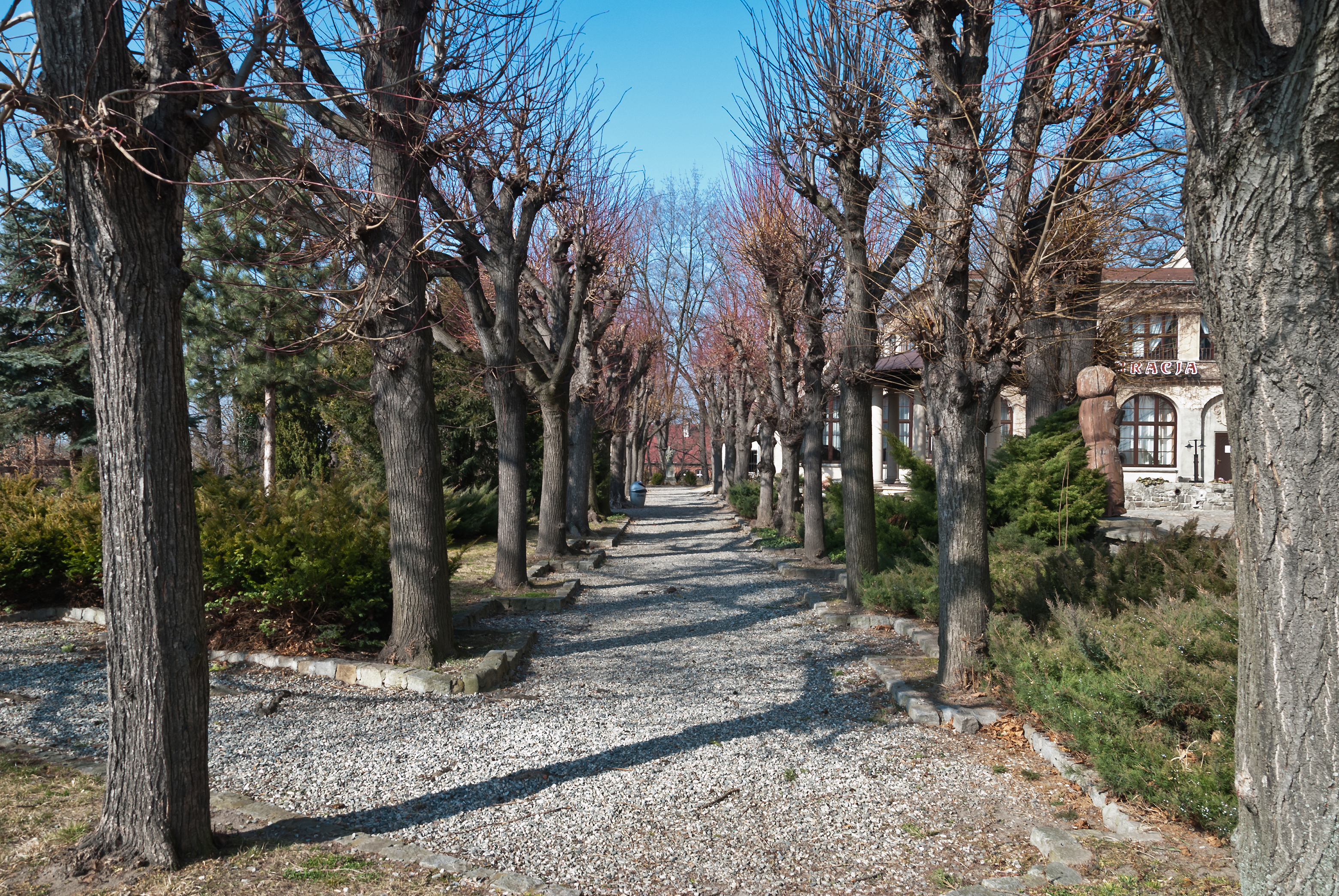 Otmuchów, park, poł. XIX, XIX/XX